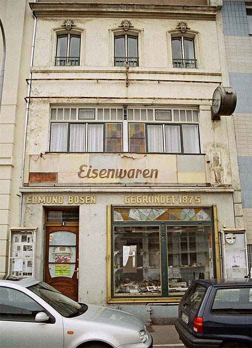 Eisenwarenladen Bosen, Marsiliusstraße 4, Köln-Sülz